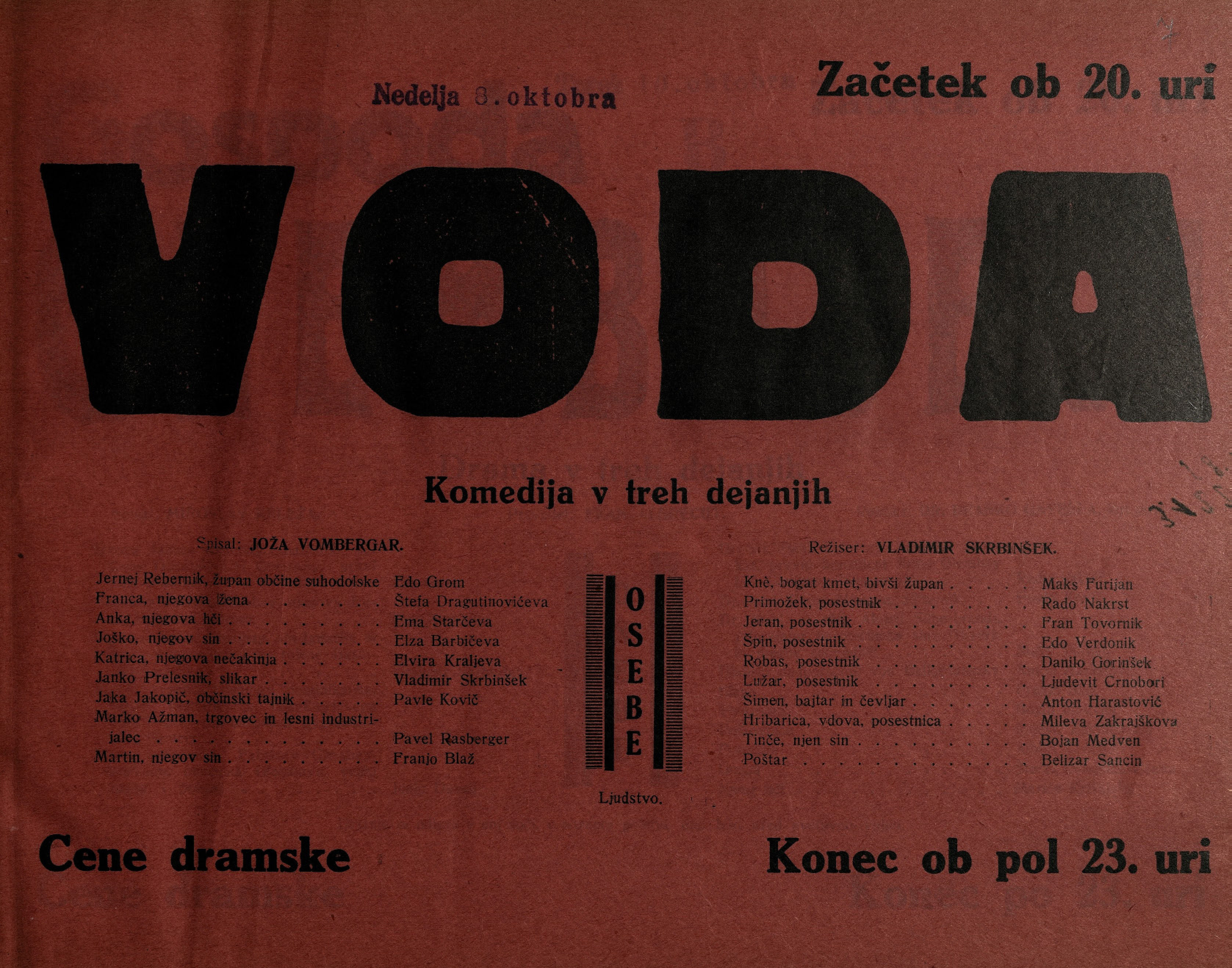 Plakat za predstavo Voda v Narodnem gledališču v Mariboru.